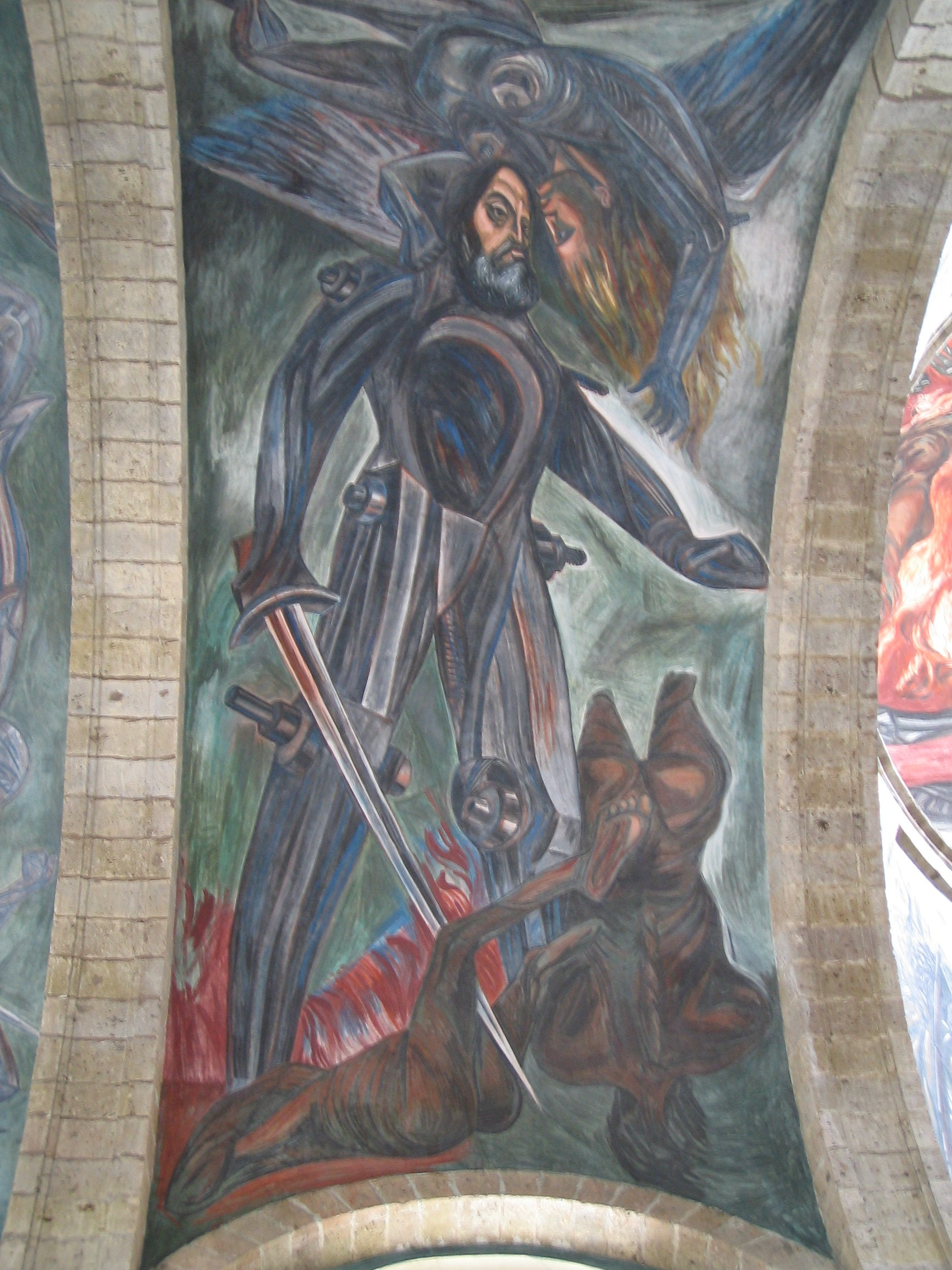 Mural painting from Orozco representing Hernán Cortés, located in Hospicio Cabañas, Guadalajara, Jalisco, Mexico